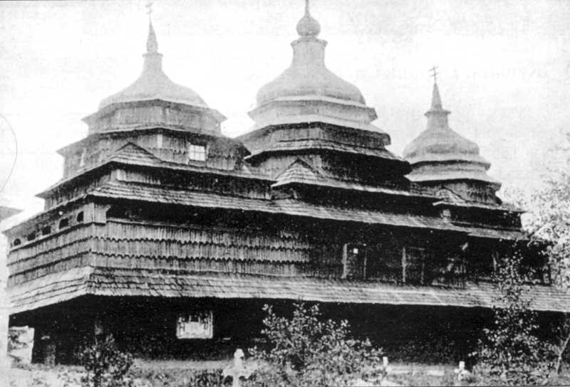 Lavochne_Cerk_Sv_Myxajila.Stara